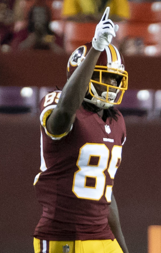 Jets at Redskins 8/16/18